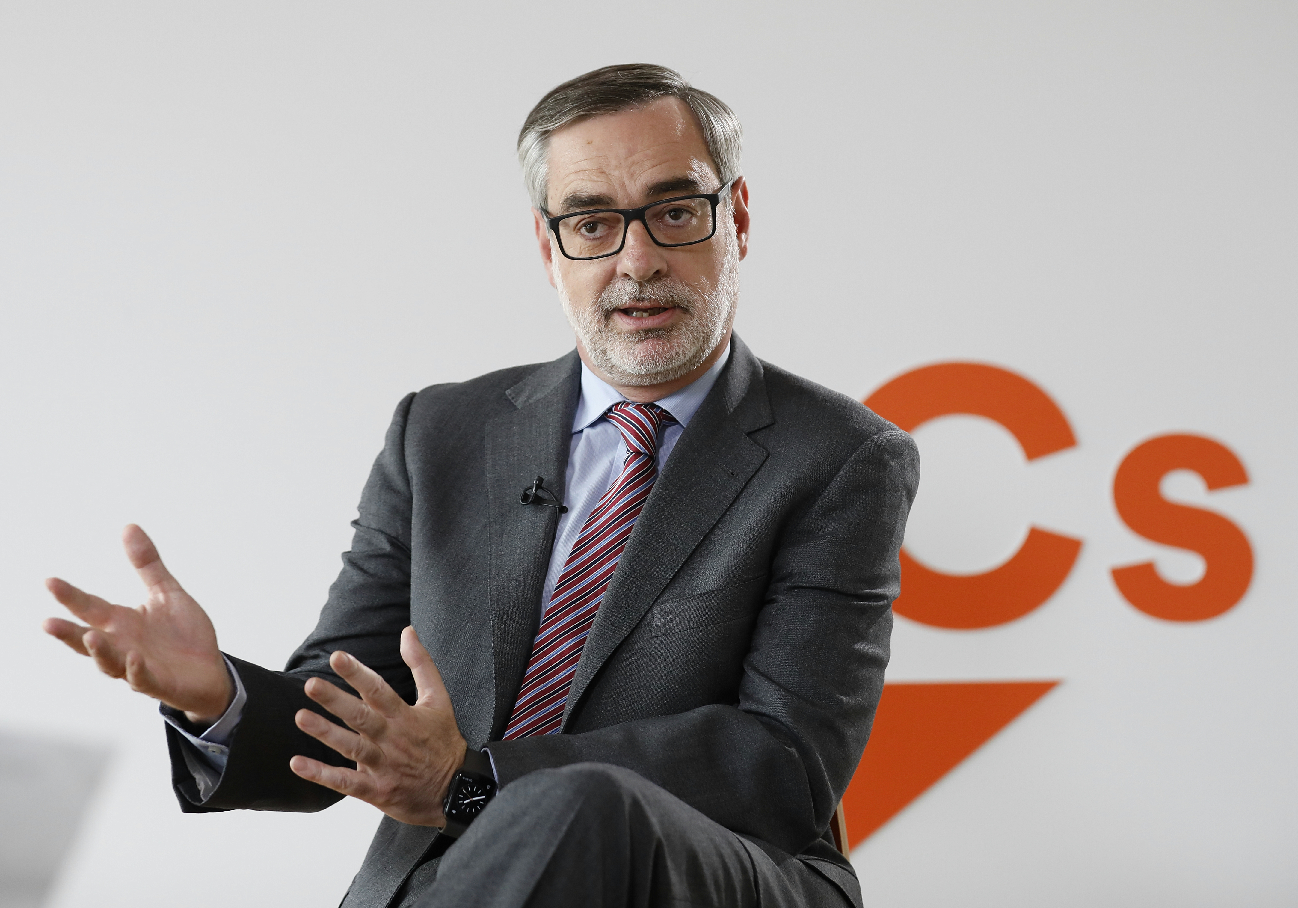 El secretario general de Ciudadanos asegura que el PP "perderá el Gobierno" si Cifuentes no ha dimitido antes de la moción de censura. El encargado de negociar con Génova habla de "condiciones" para hacer presidente a Gabilondo, entre las que no descarta pedir entrar en el Ejecutivo. Descarta nuevas conversaciones con el PP y afirma que el caso máster está "separado" de la negociación de los presupuestos generales del Estado